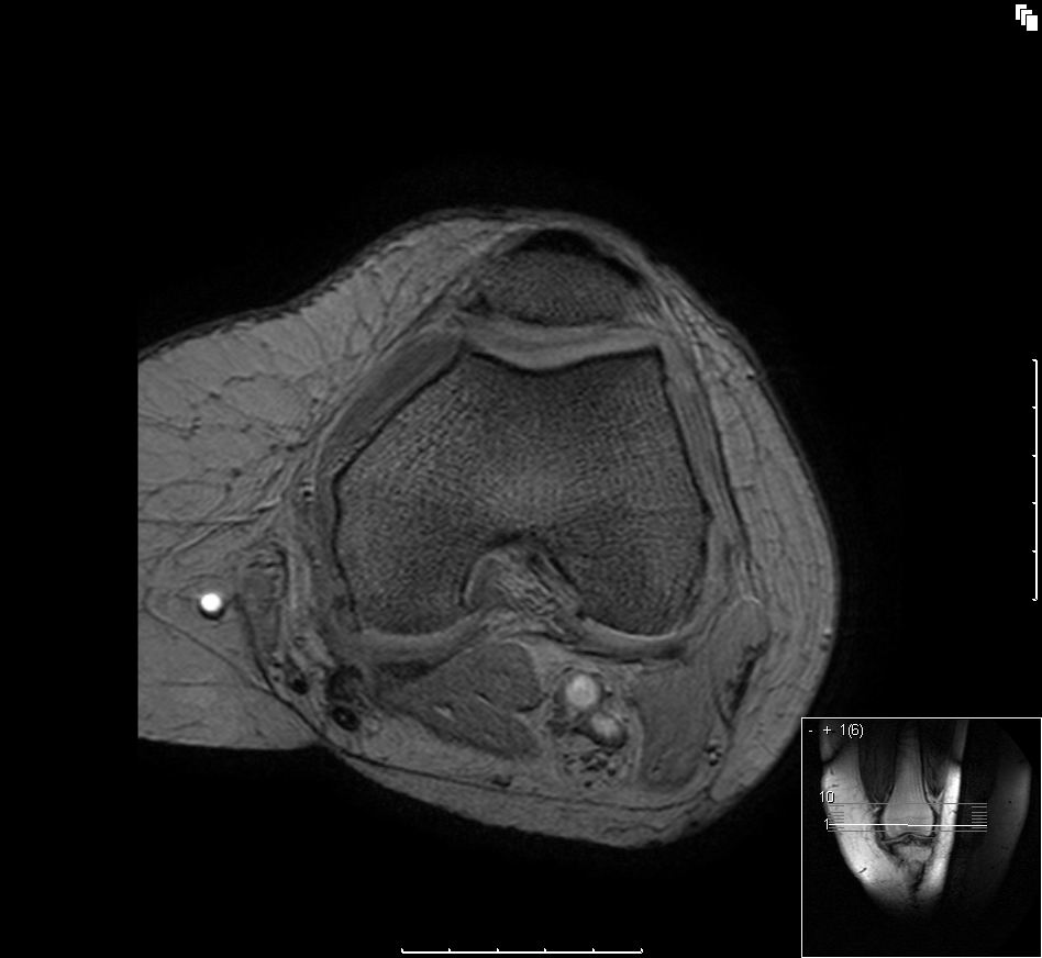 Bildbeschreibung: Patellagleitlager Quelle: eigene Aufnahme Datum: Autor: User:Scuba-limp